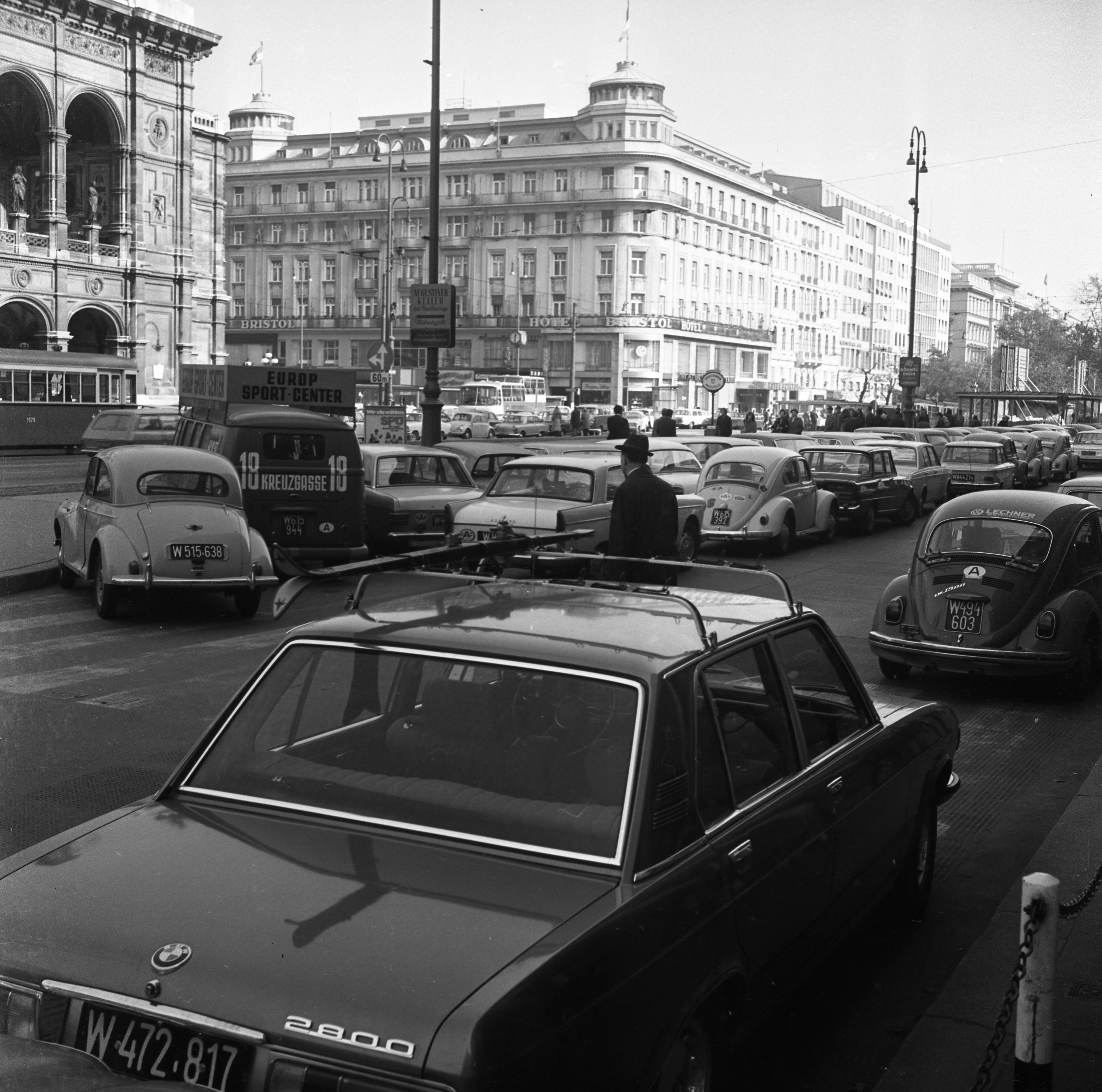 Opernring, szemben a Kärntner Strasse kerszteződése, balra az Operaház Location: Austria, Vienna Tags: BMW-brand, number plate, tram, Volkswagen Beetle, country code sign, Renaissance Revival, August Sicard von Sicardsburg-design, Eduard van der Nüll-design Title: Opernring, szemben a Kärntner Strasse kerszteződése, balra az Operaház